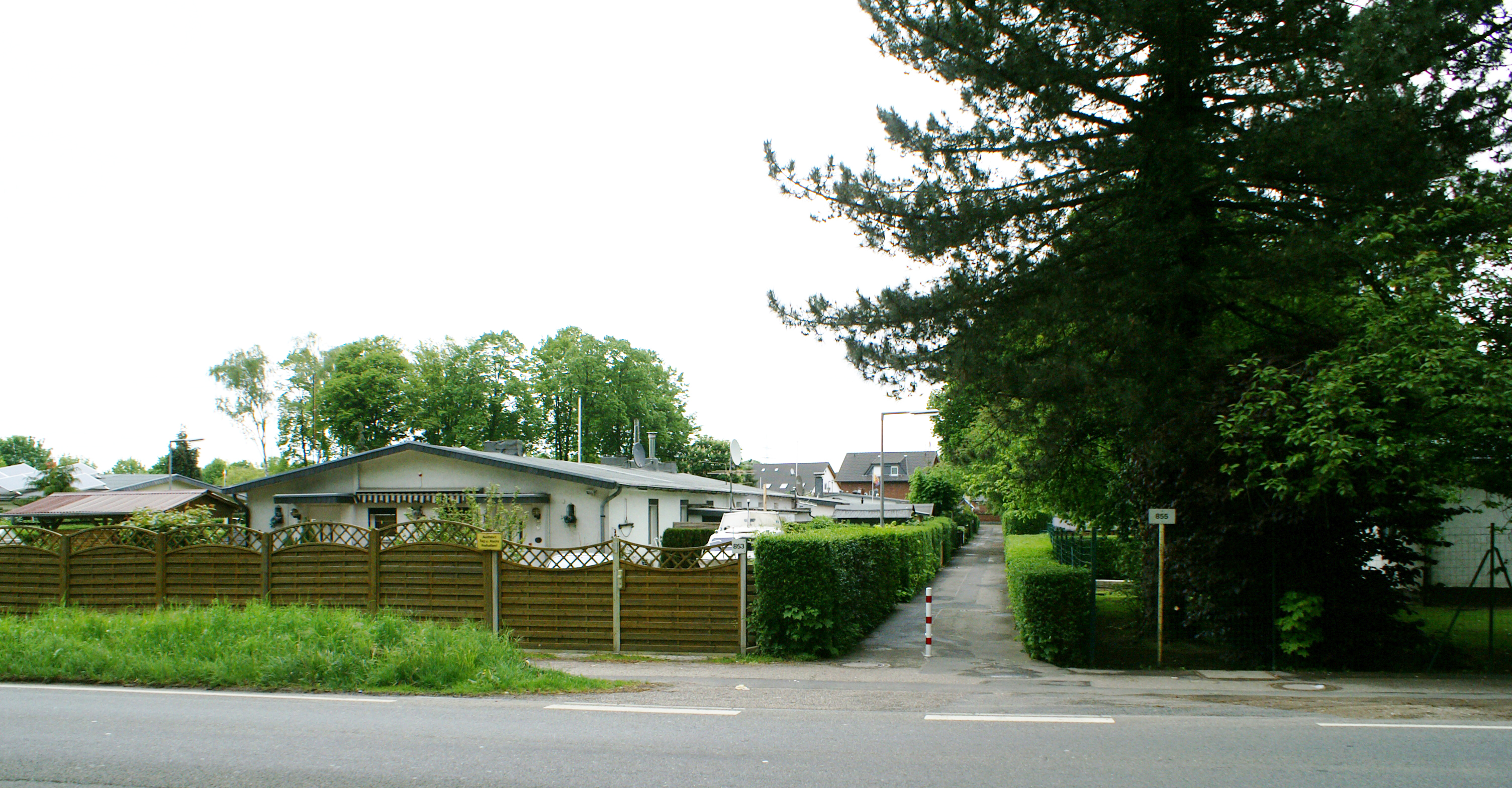 Humboldtsiedlung an der Frankfurter Straße in Köln-Ostheim